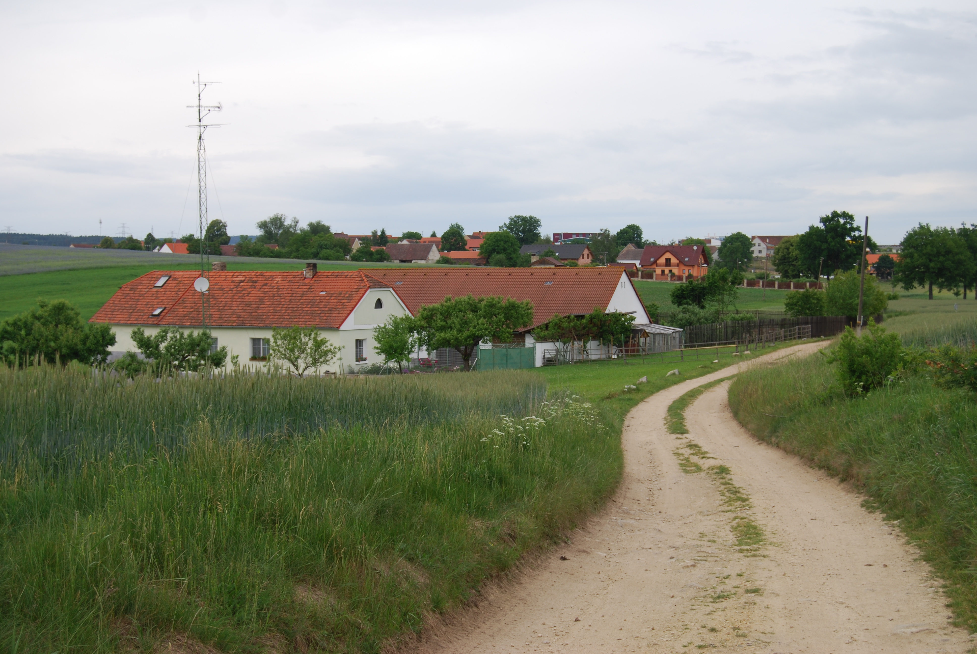 Malé Nepodřice je část obce Dobev v okrese Písek. Česká republika.